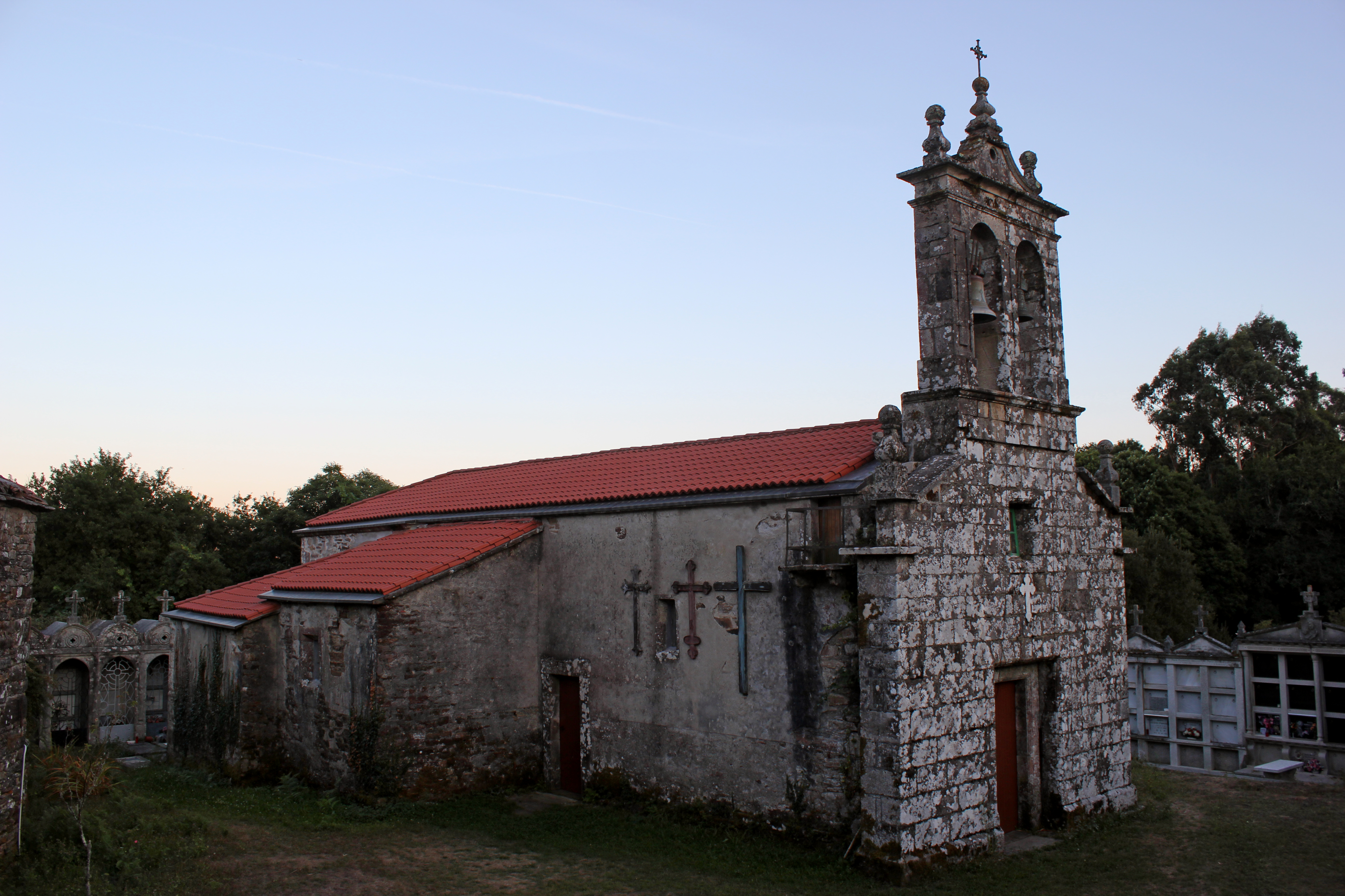 Igrexa de Castrelo, Forcarei.